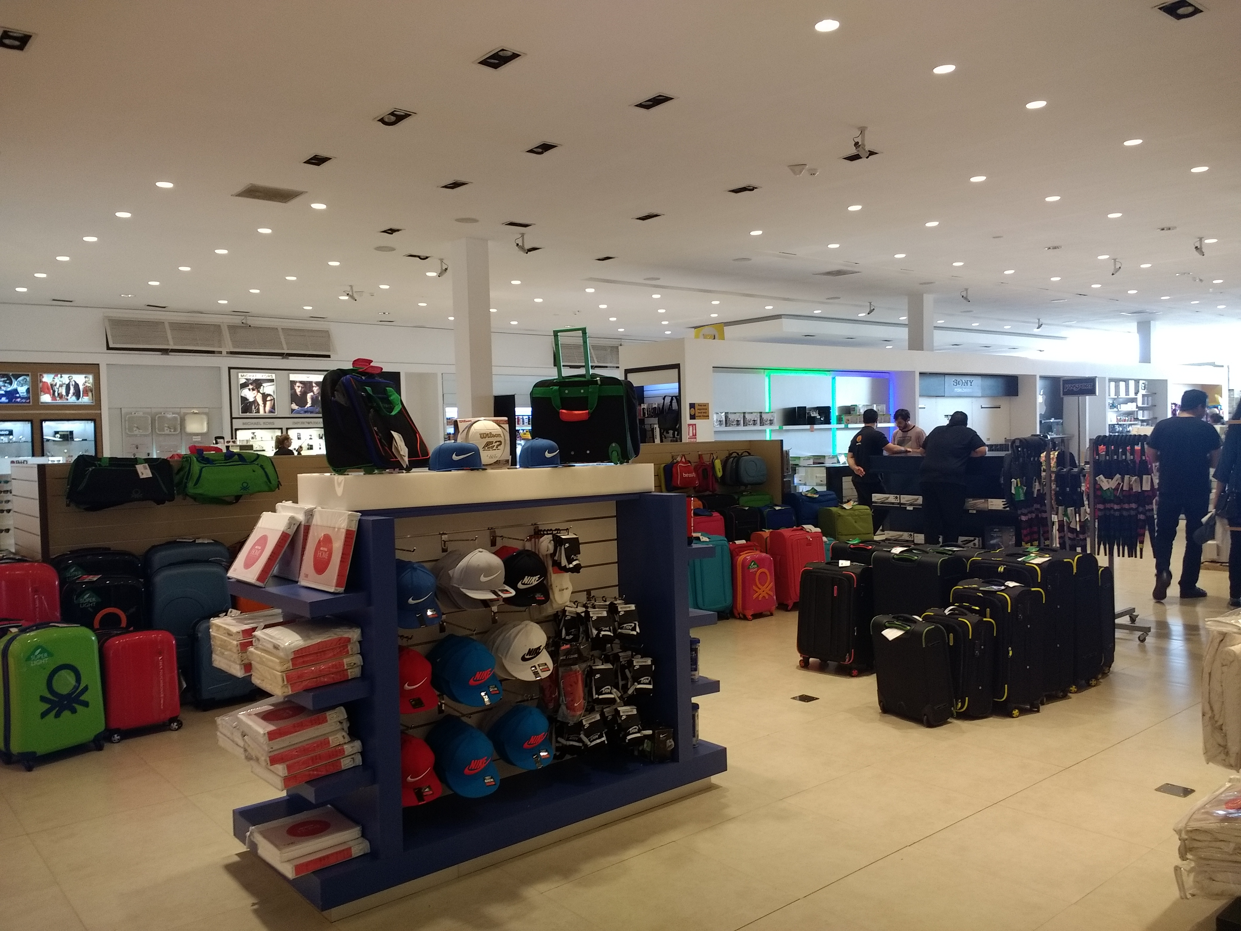 Neutral Free Shop, Bella Unión - interior